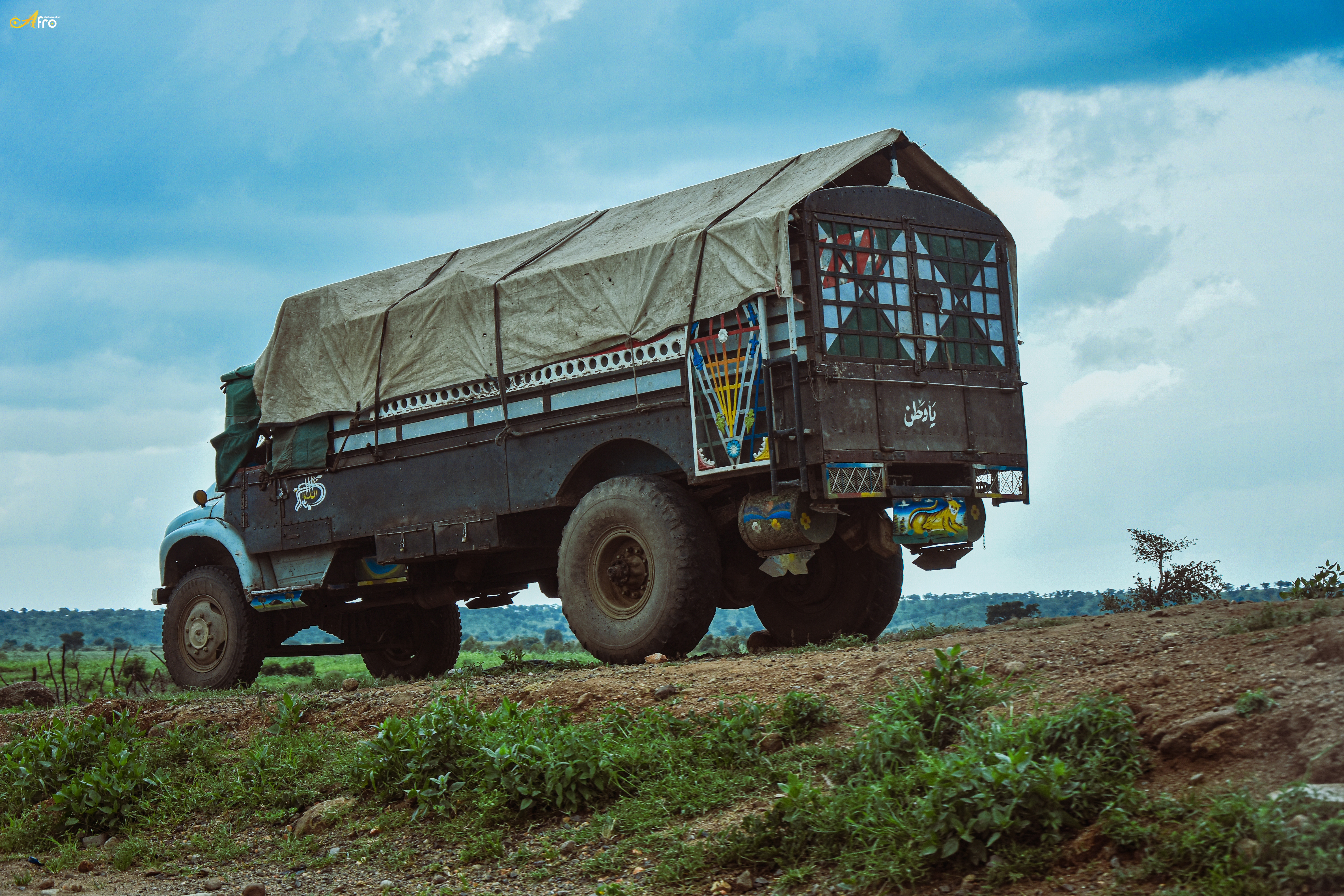 WLASudan2020 This is an image with the theme "Africa on the Move or Transport" from: Sudan ولاية وسط دارفور .محلية غرب جبل مرة . نرتتي